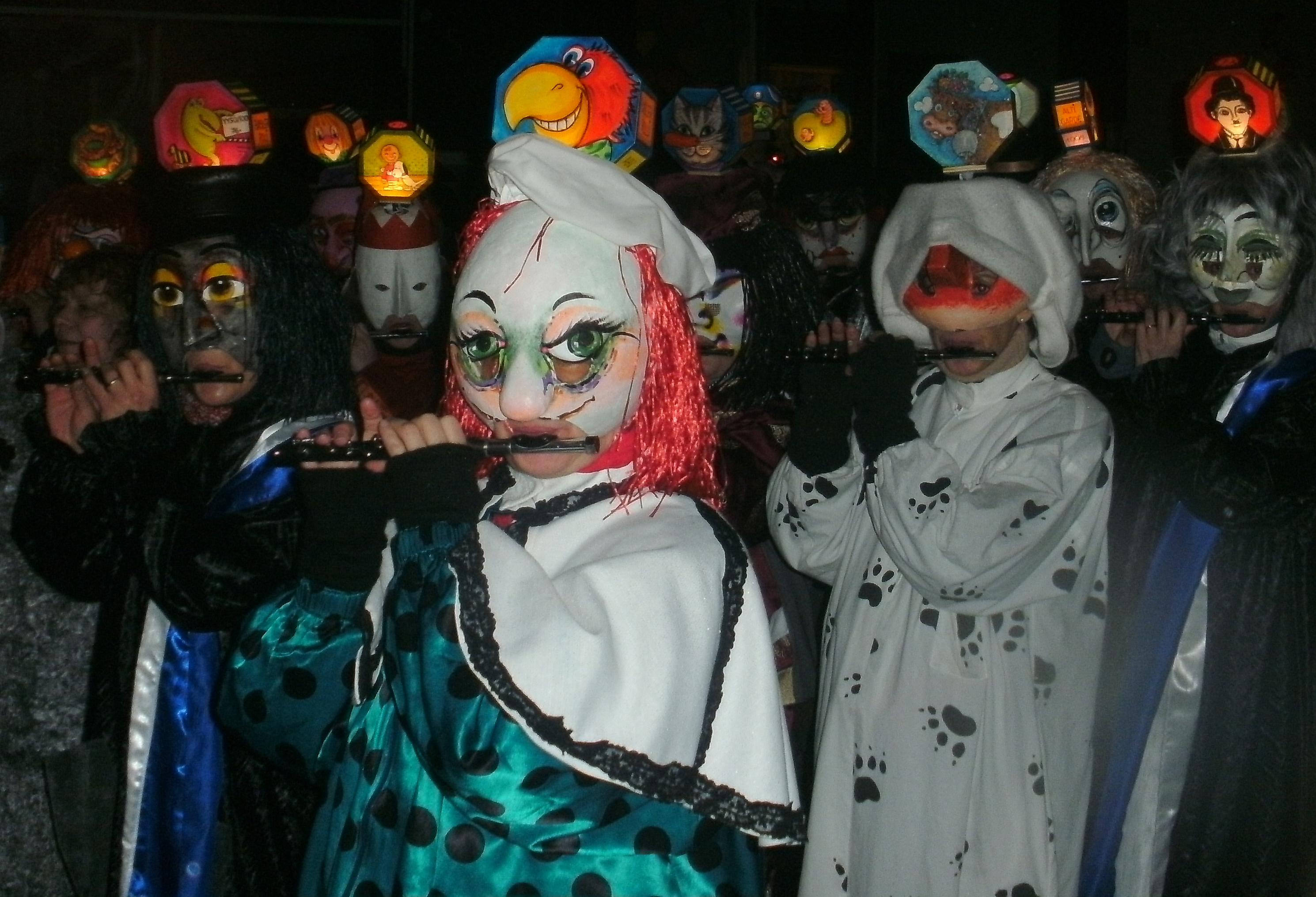 Maskierte Piccoloflötenspieler mit Kopflaternen beim Morgestraich 2010 in Basel.